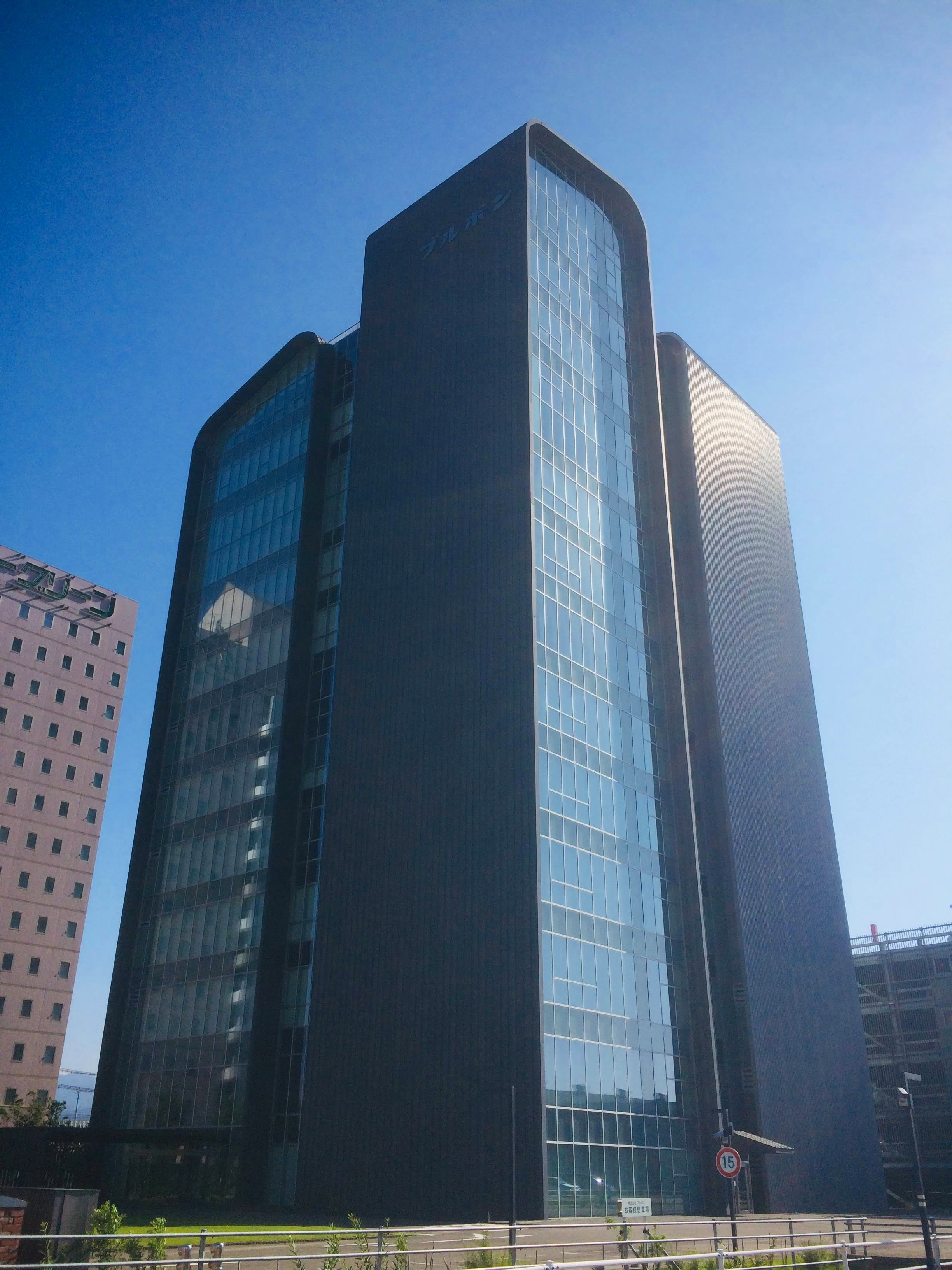 ブルボンの本社